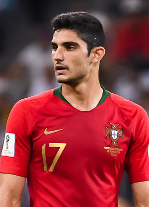 Хет-трик Роналду приносит Португалии ничью в пиренейском дерби